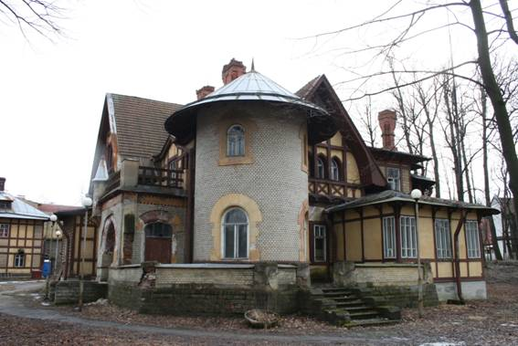 Дача Гусвальд